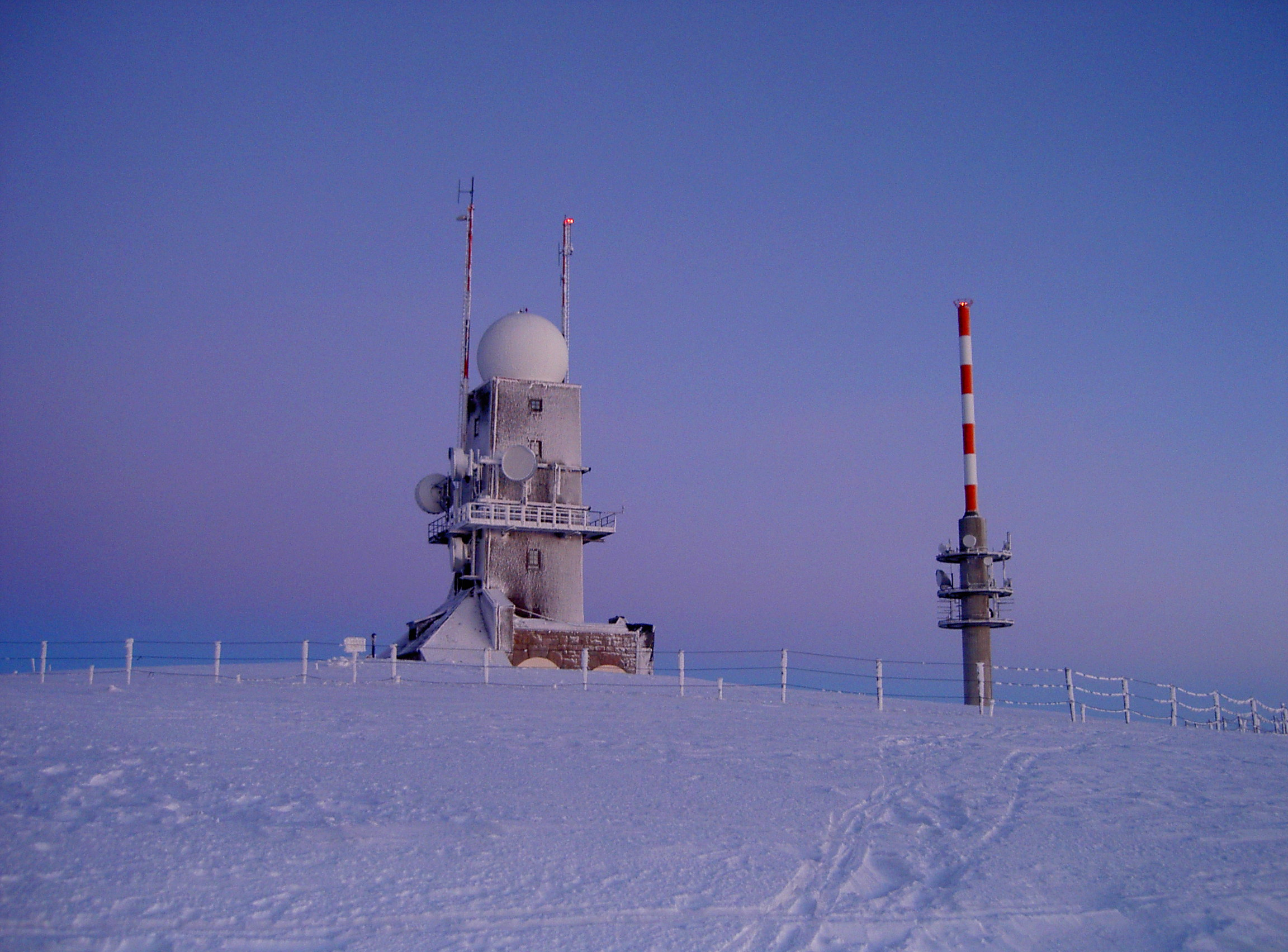 Feldberg (Schwarzwald) Radarstation und Turm